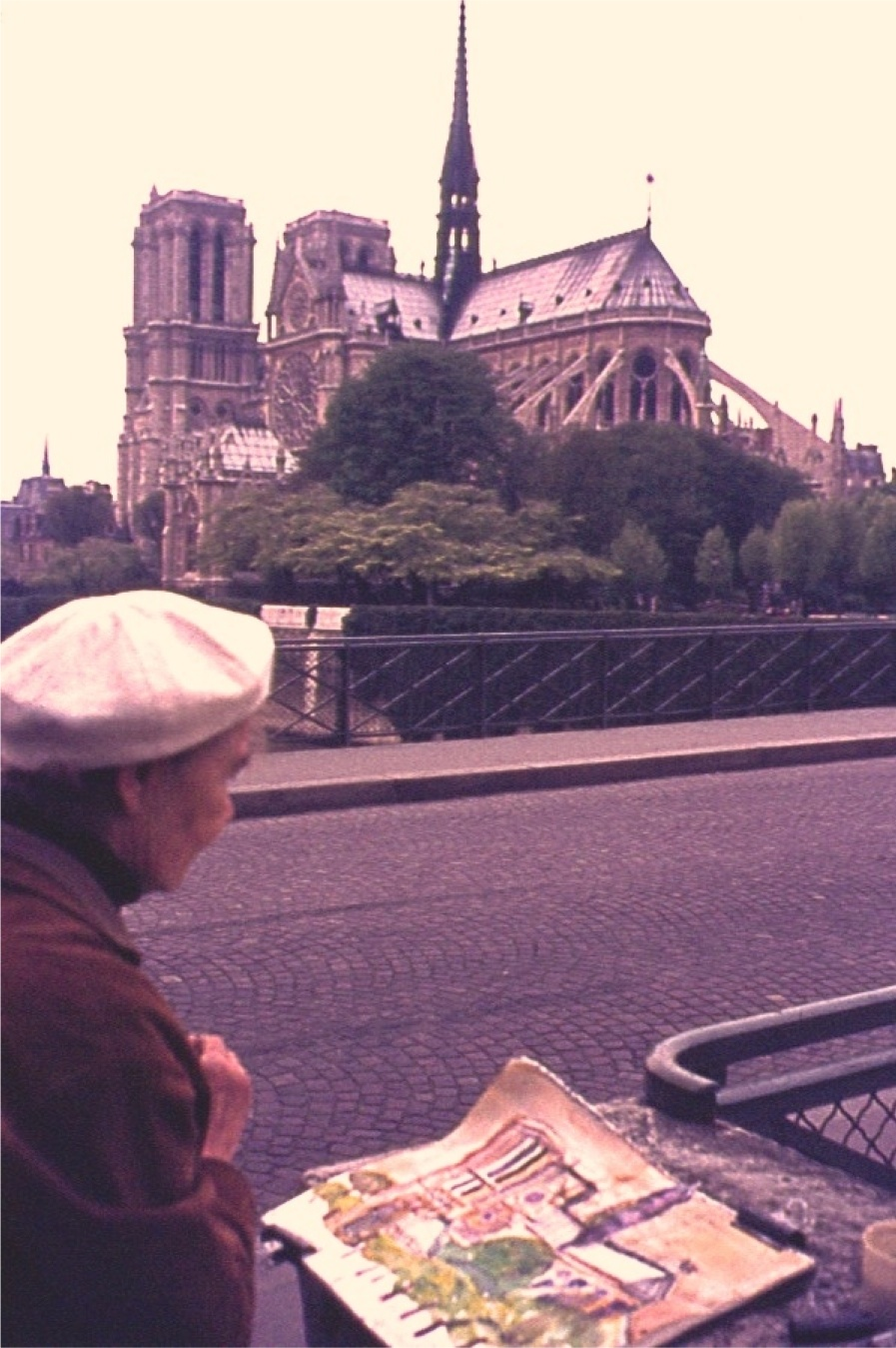 Clara Vogedes à Paris